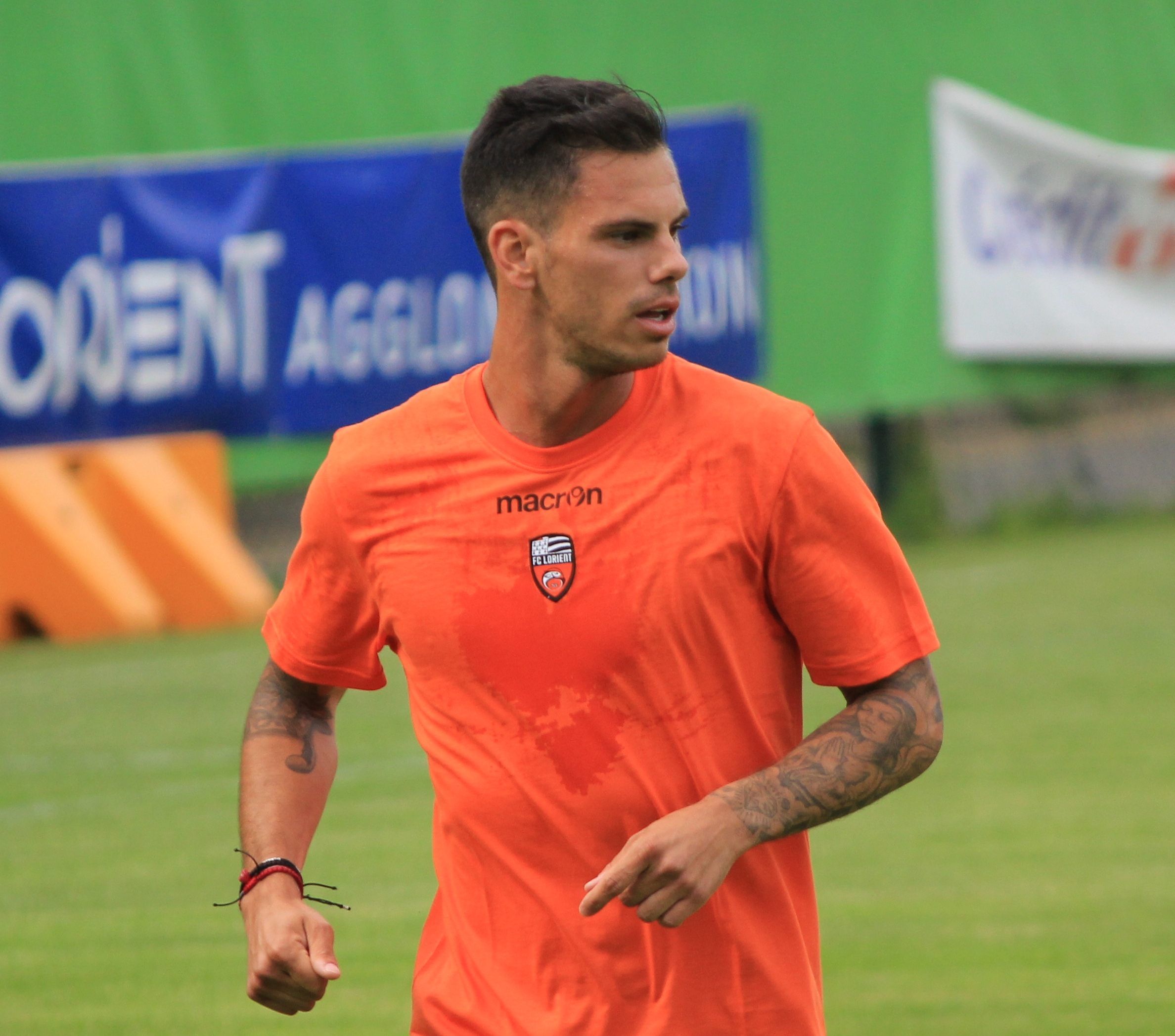 Jérémie Aliadière lors de la reprise de l'entrainement du FC Lorient le 27 juin 2013